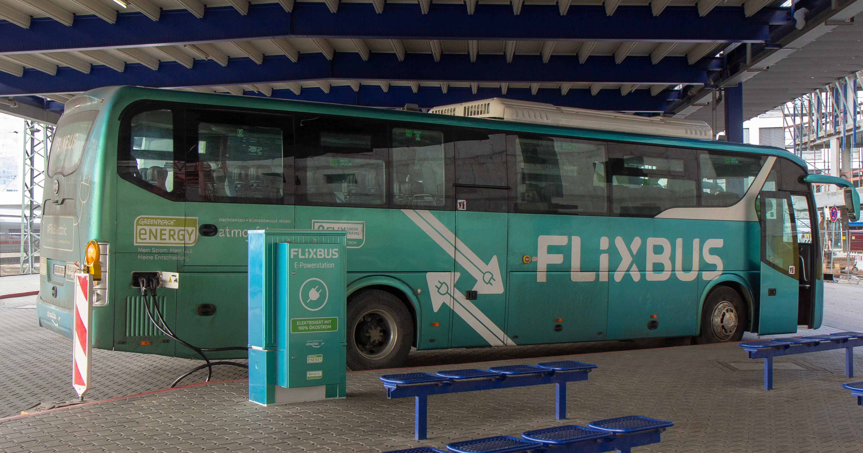 Fahrt mit dem E-Bus von Flixbus von Frankfurt nach Mannheim mit Akkreditierung der Pressestelle.